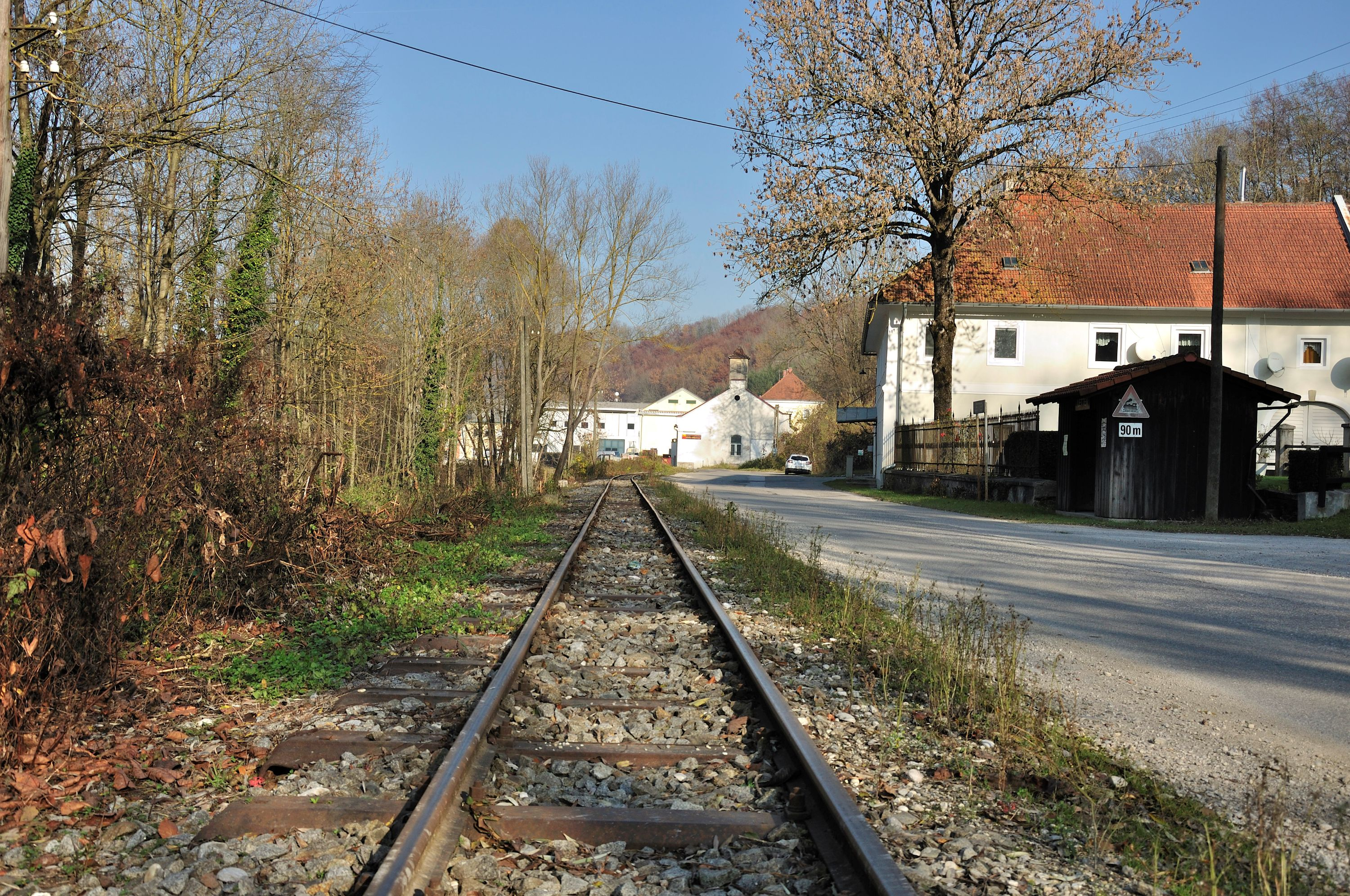 Eisenbahnstrecke in Neuzeug - Steyrtalbahn im Bereich der Haltestelle Letten / Lettmühle